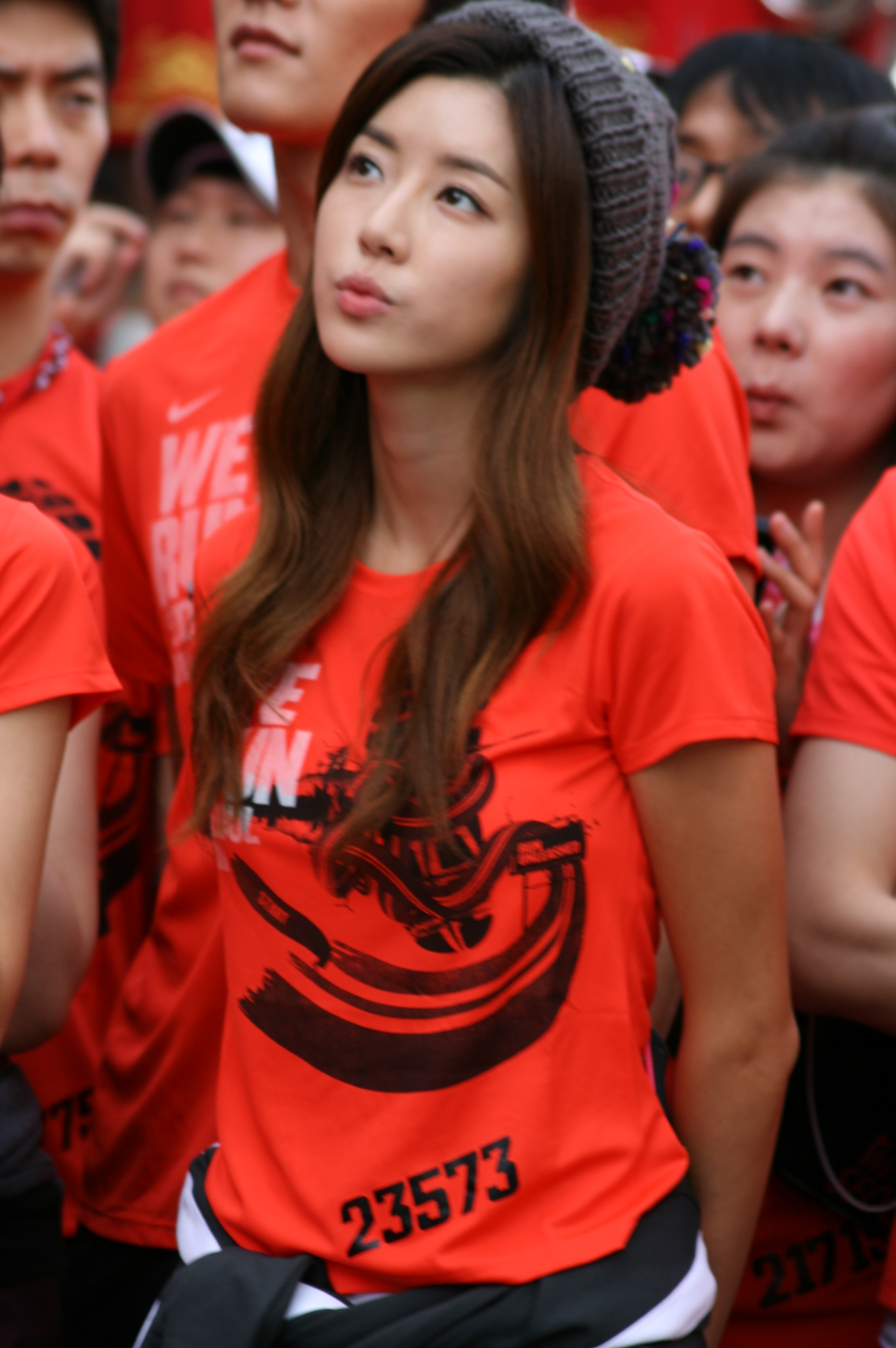 박한별 나이키위런서울텐케이 378